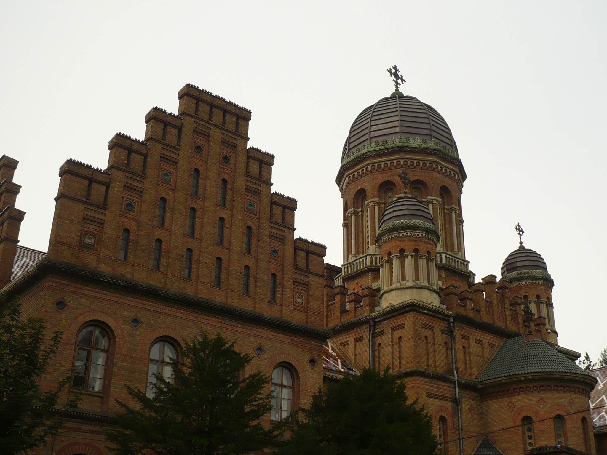 Czerniowce, cerkiew w uniwersytecie, 2009 r.